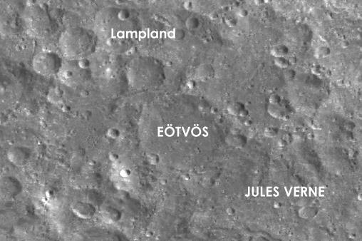 Detalle de la imagen Moonmap from clementine data-Eötvös.jpg del cráter Eötvös